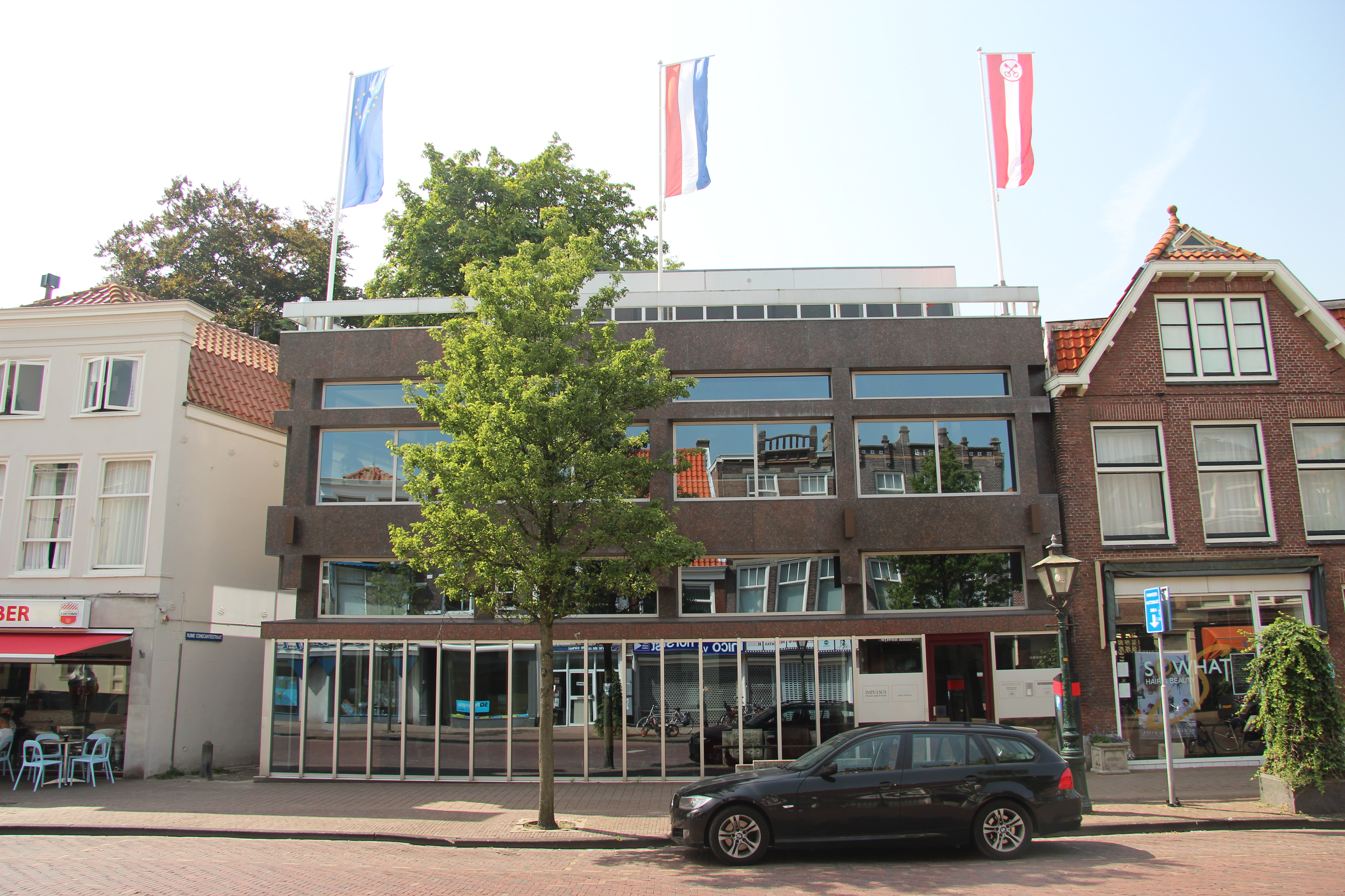 Doezastraat 35-37 Leiden. De Leidsche Spaarbank (sinds 1966 geheten de Leidse Spaarbank) werd op 15 oktober 1818 opgericht door het Departement Leiden van de Maatschappij tot Nut van 't Algemeen. Het nieuwe hoofdkantoor aan de Doezastraat 35 kwam pas na de fusie met de Stichting Nutsspaarbank 's-Gravenhage gereed. Later in gebruik bij de Fortisbank.